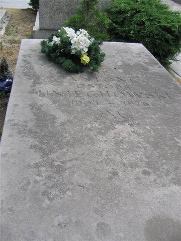 Antoni Uniechowski's monument (Powązki Cemetery; Cmentarz Komunalny, d. Wojskowy)